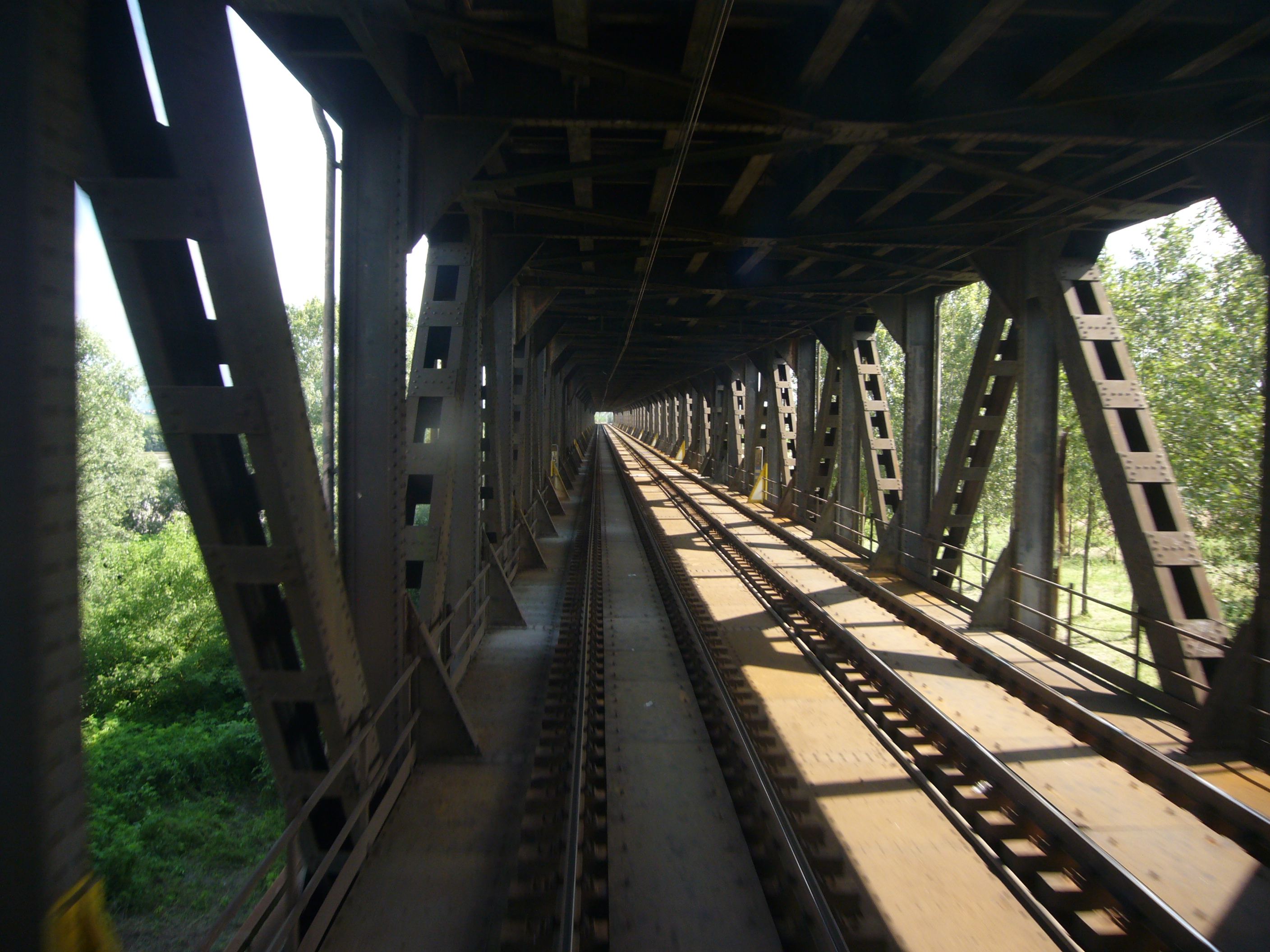 Ponte sul fiume Po di Bressana Bottarone, linea Genova-Milano